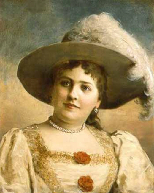 Bildnis Antonie Schläger, Wien um 1890, Öl auf Leinwand, 55 x 48 cm Theaterwissenschaftliche Sammlung der Universität zu Köln, Schloss Wahn, Inv.Nr. 4686